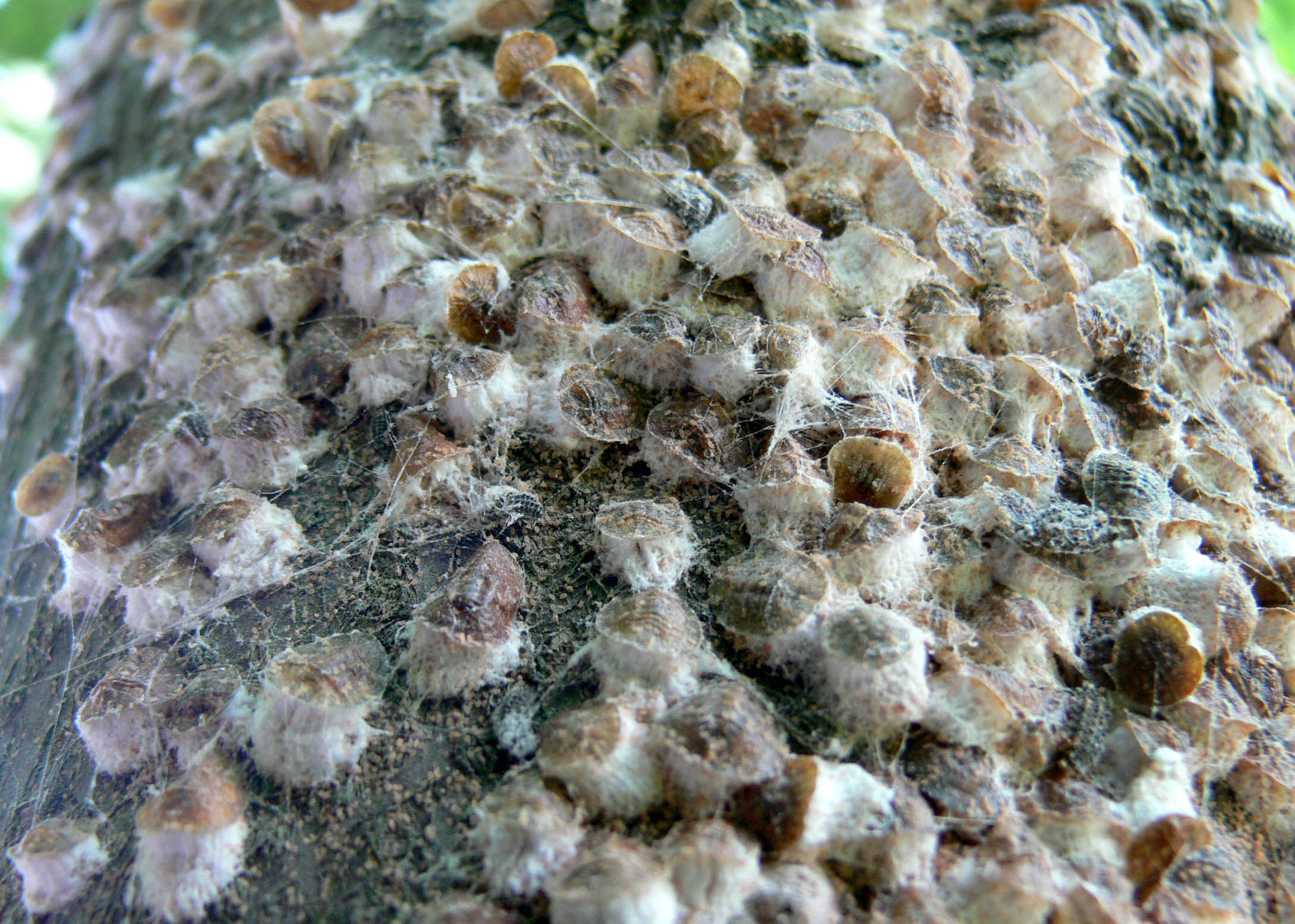 Cochenilles femelles (hémiptères parasite des végétaux du sous-ordre des Sternorhynques), sur troncs de jeunes tilleul, en bordure de canal de la Deûle, à Lambersart, dans le nord de la France